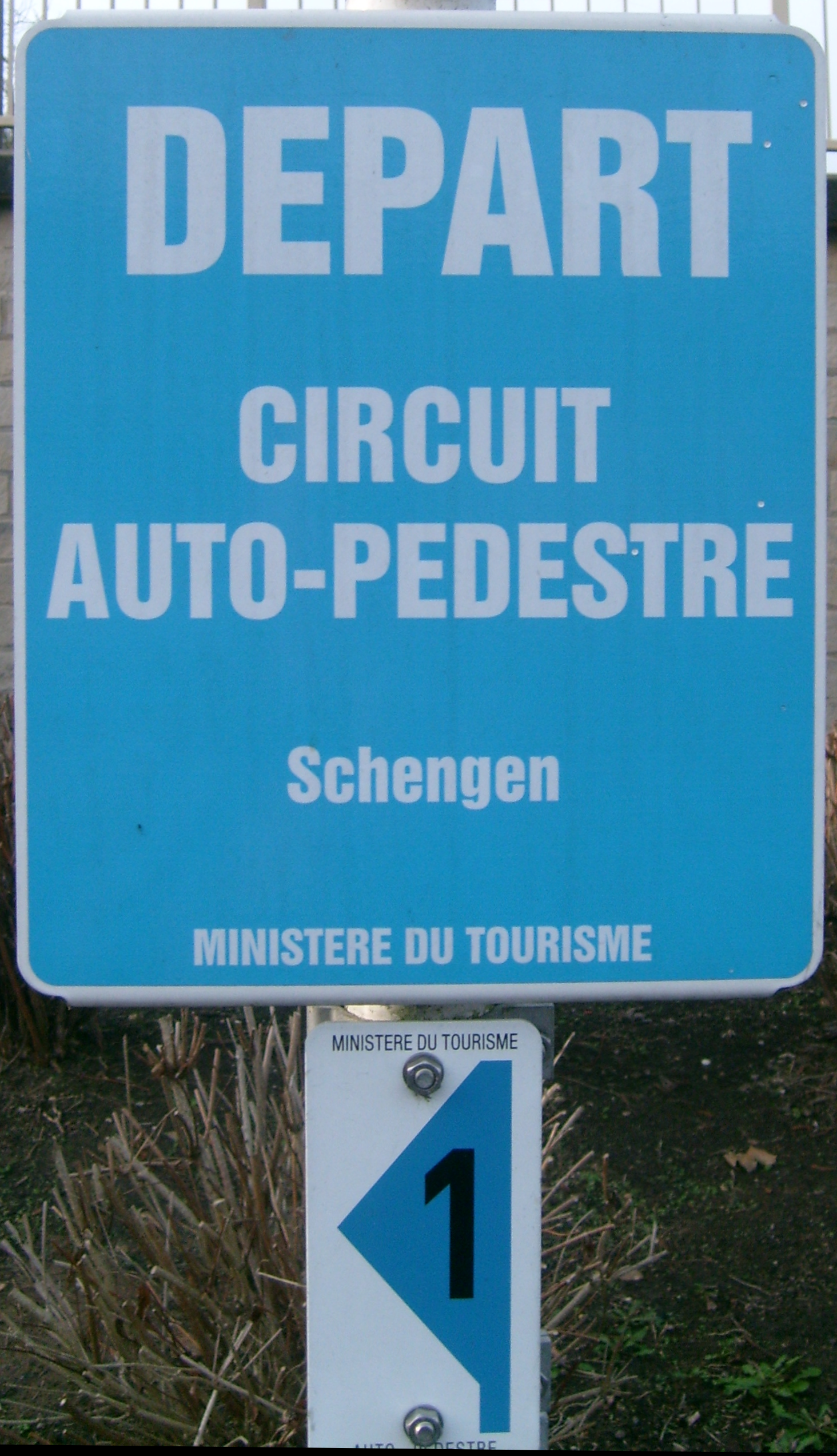 Schëlter um Depart vum Circuit auto-pédestre zu Schengen ënnert der Bréck.